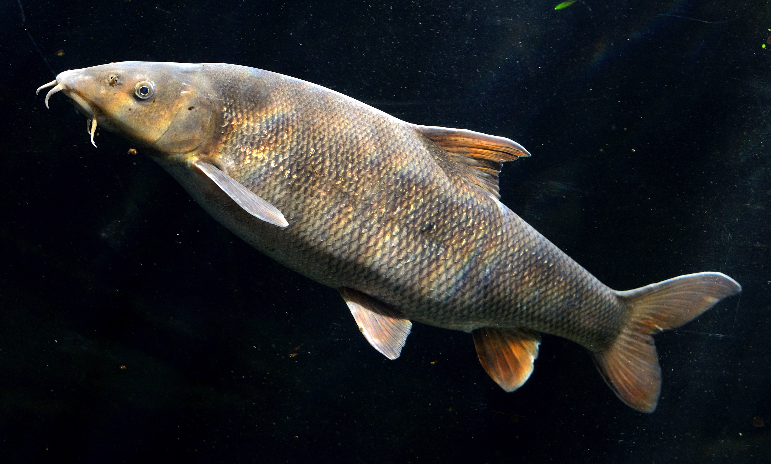 Barbe im Tiergarten Schönbrunn